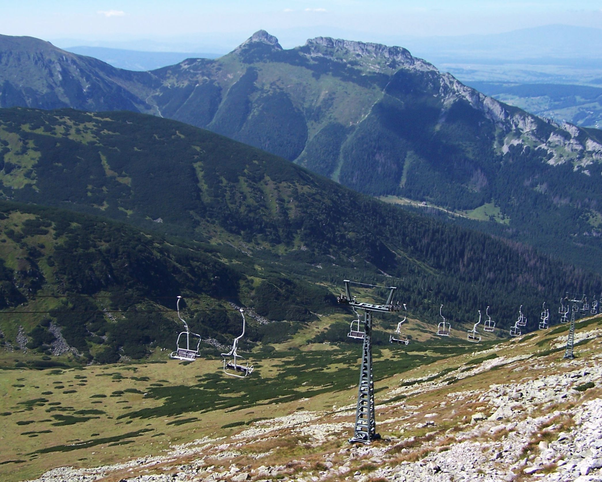 Wyciąg krzesełkowy w Dolinie Goryczkowej w Tatrach